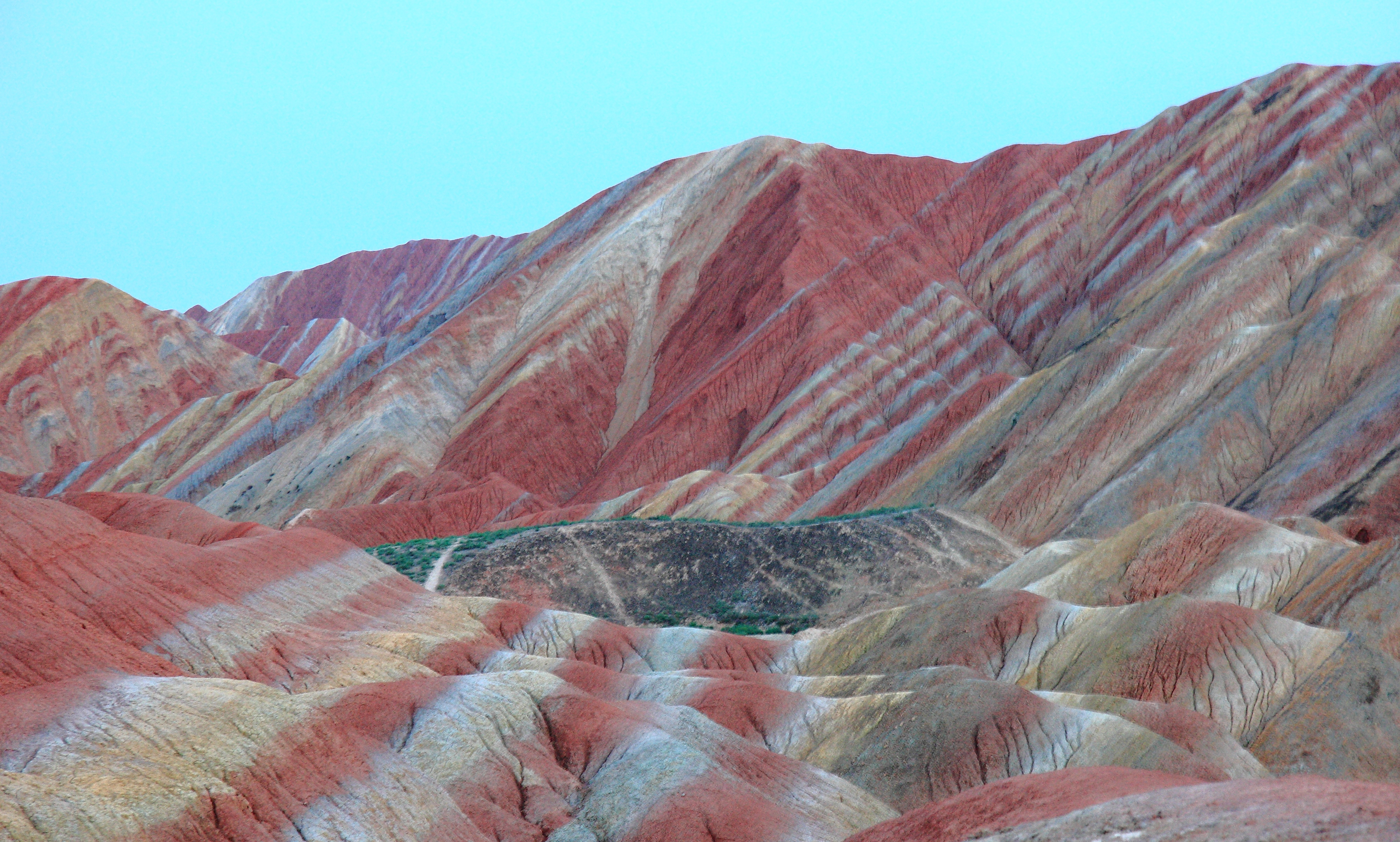 Linze, Zhangye, Gansu, China